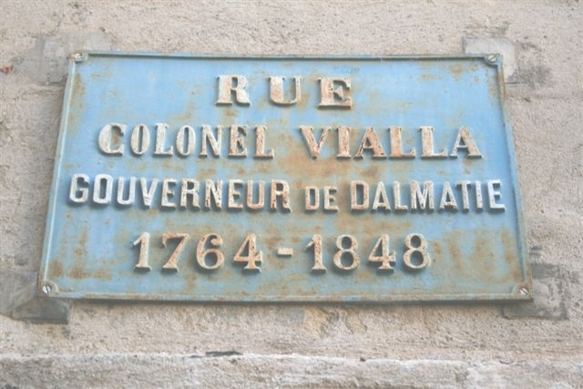 Plaque de la rue du colonel Vialla à Sommières (Gard)